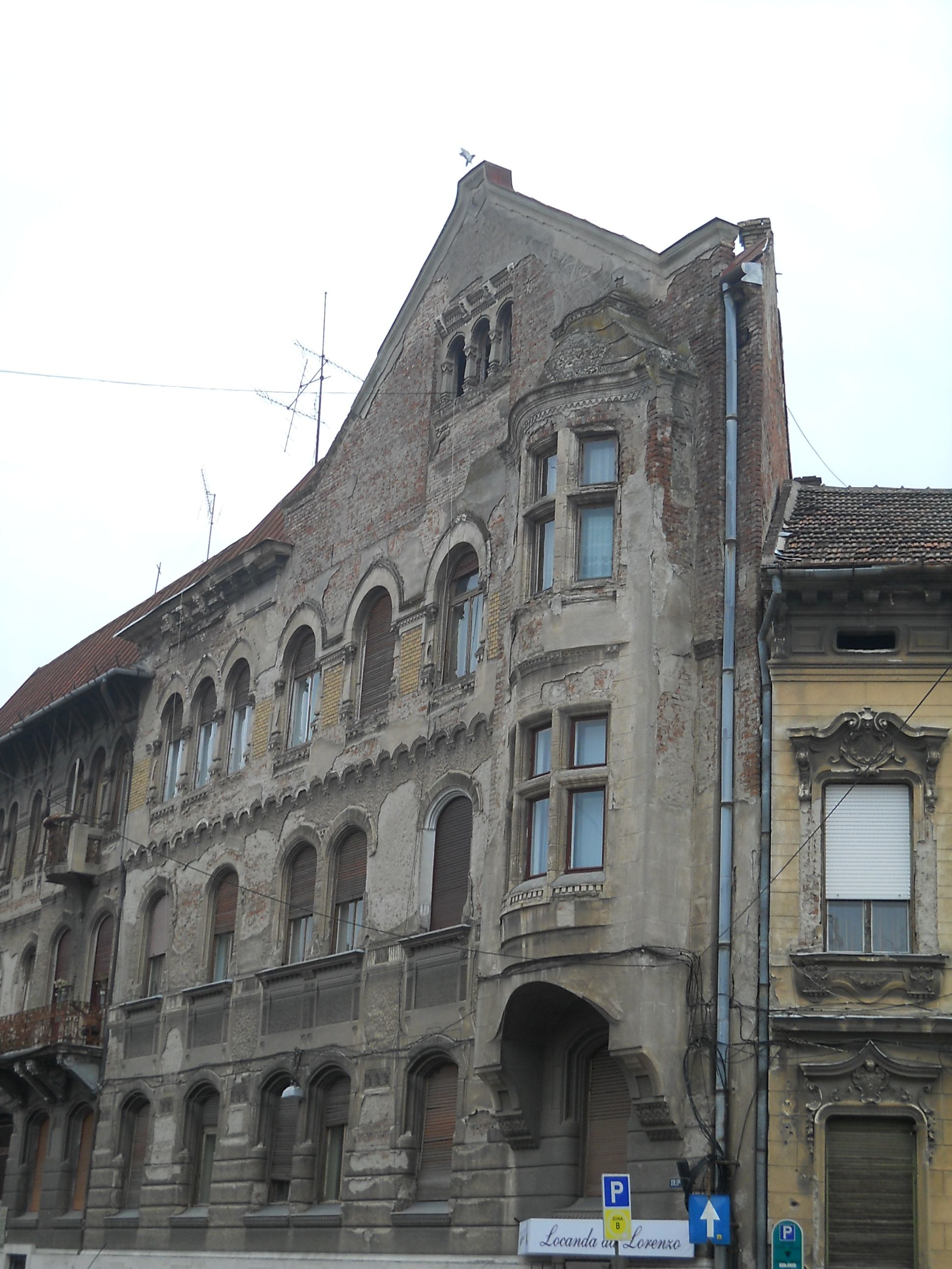 Fatada cladirii